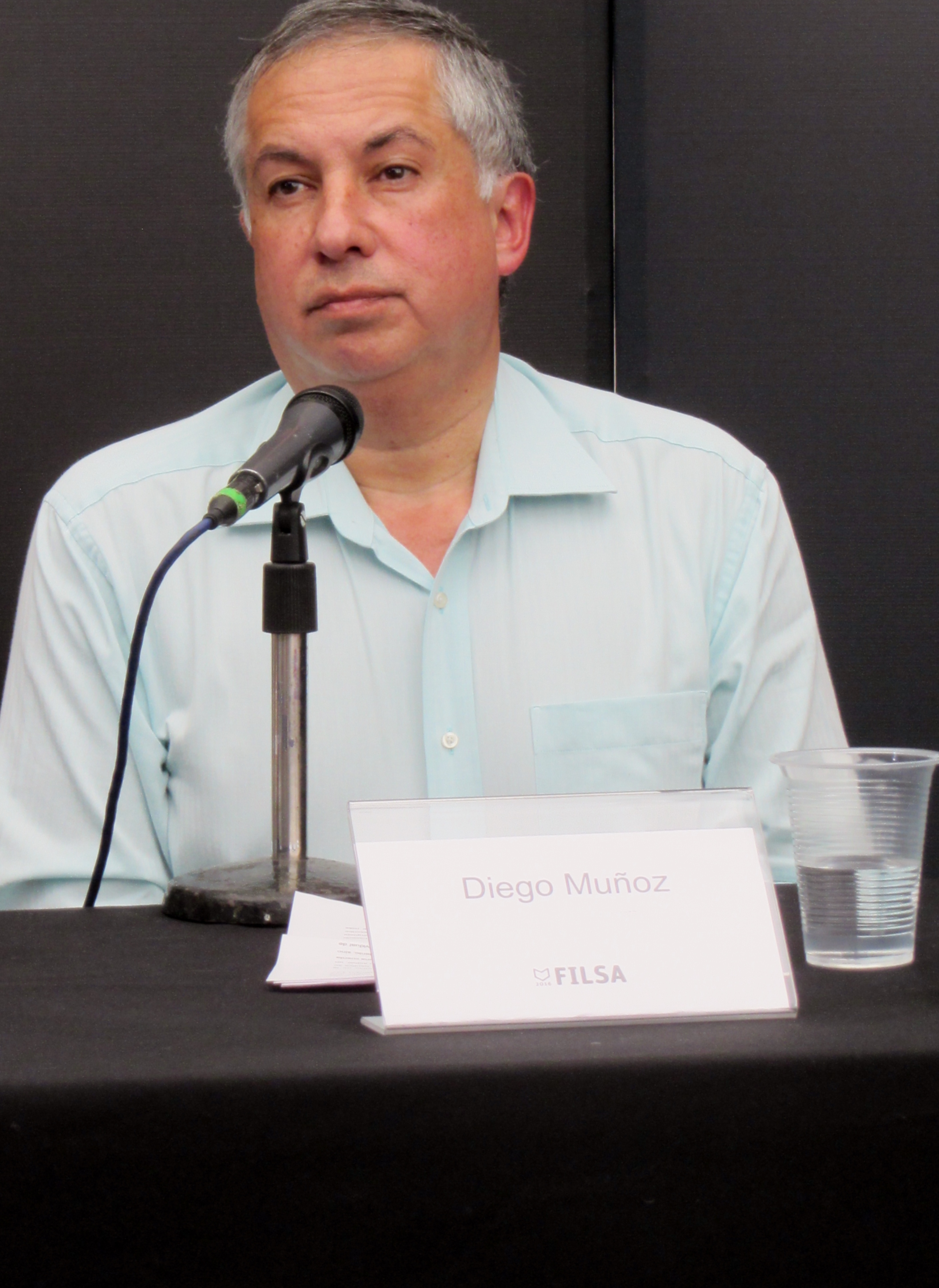 El escritor chileno Diego Muñoz Valenzuela en la Feria Internacional del Libro de Santiago 2016